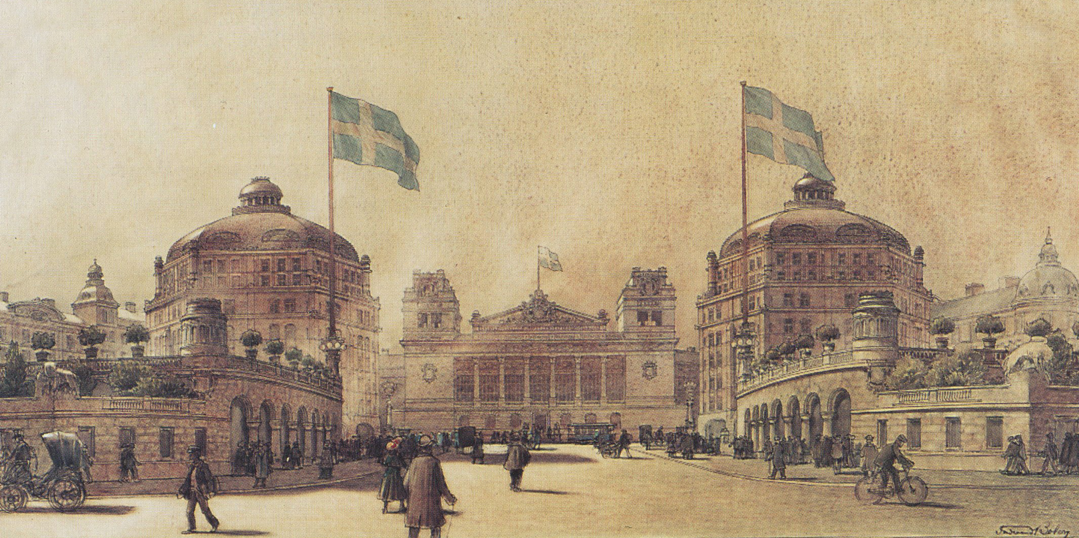 Förslag till nygestaltning av Slussenområdet